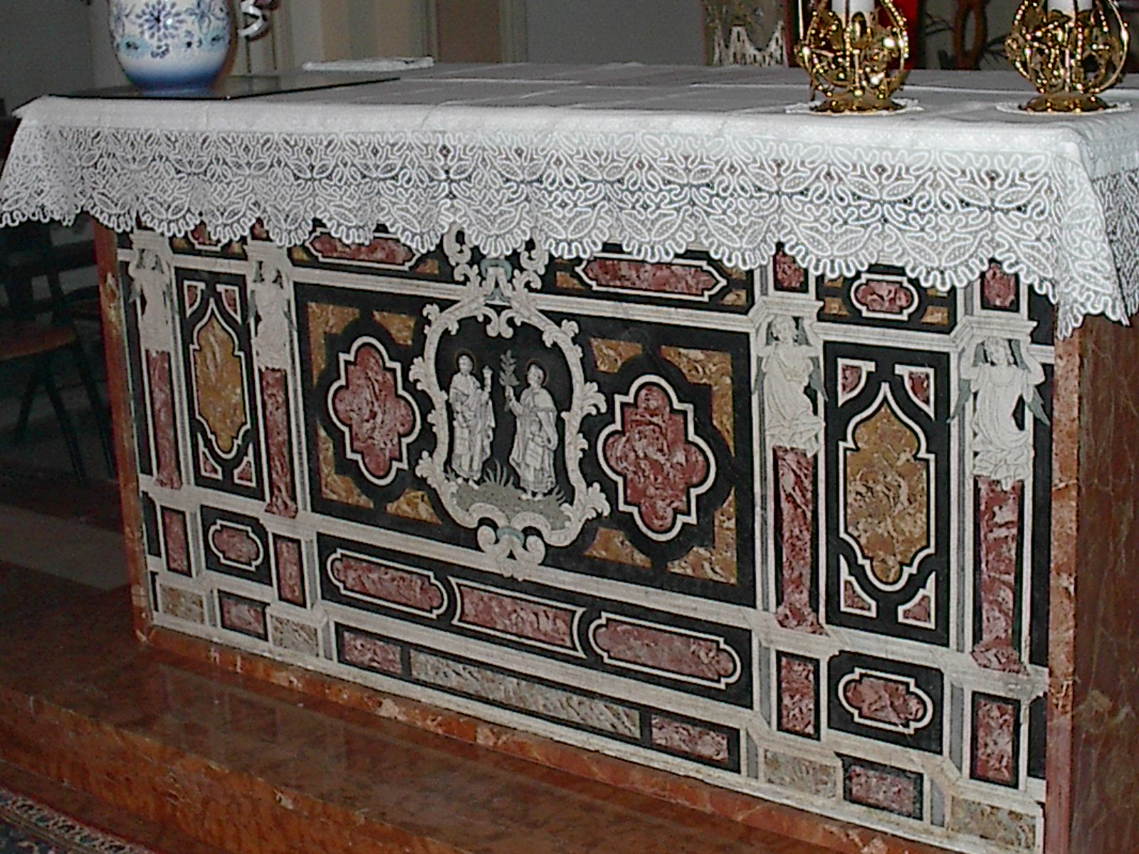 altare della chiesa di S. Antonio abate in Cicogni di Pecorara (PC)